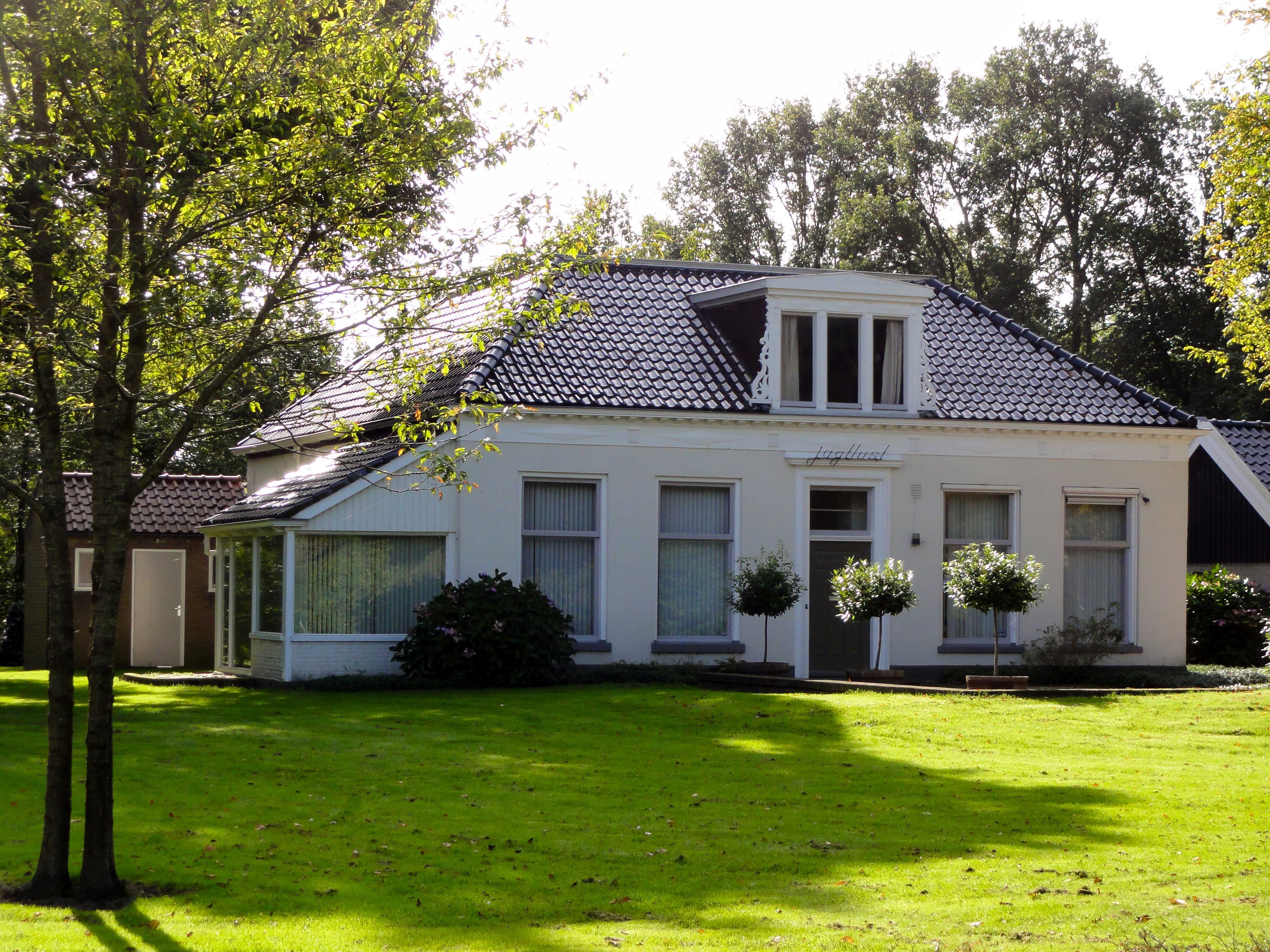 Jagtlust in Bargebek, een buurtschap in Gaasterlân-Sleat